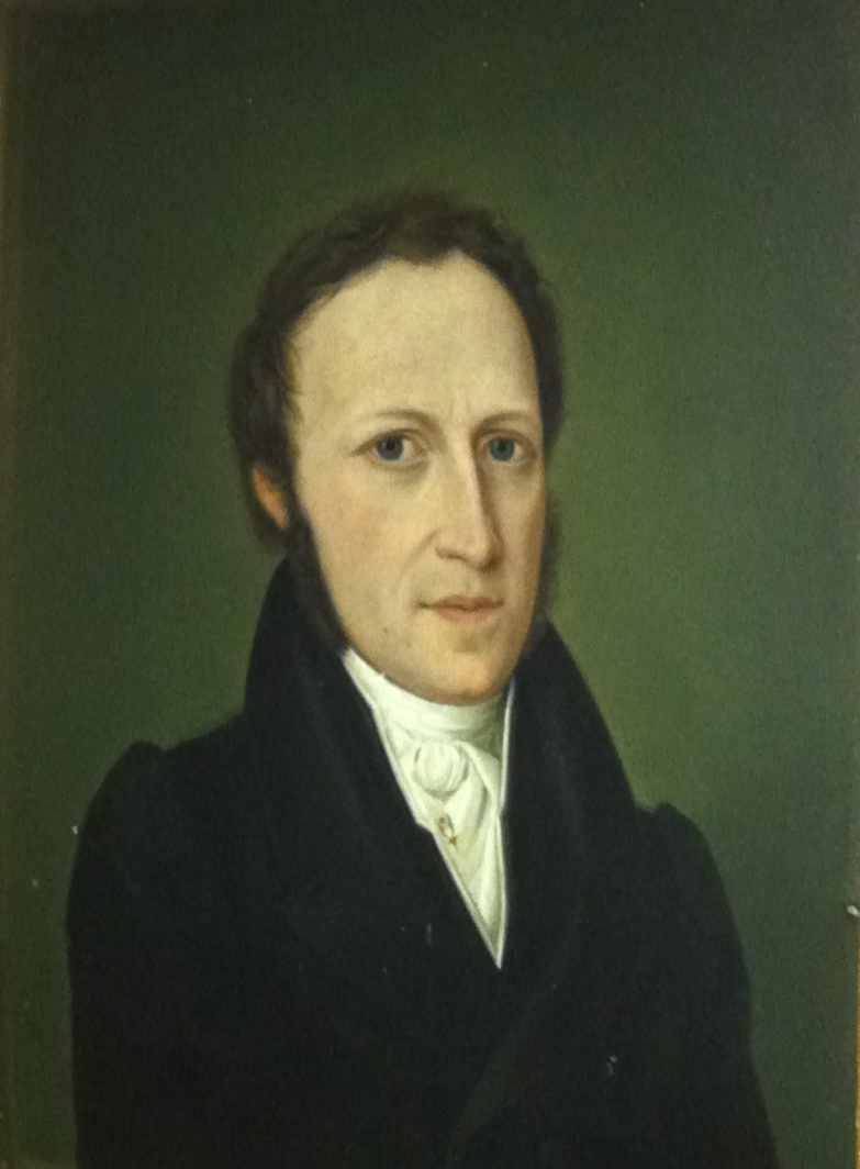 Ahlert Hysing, første rektor i Larvik